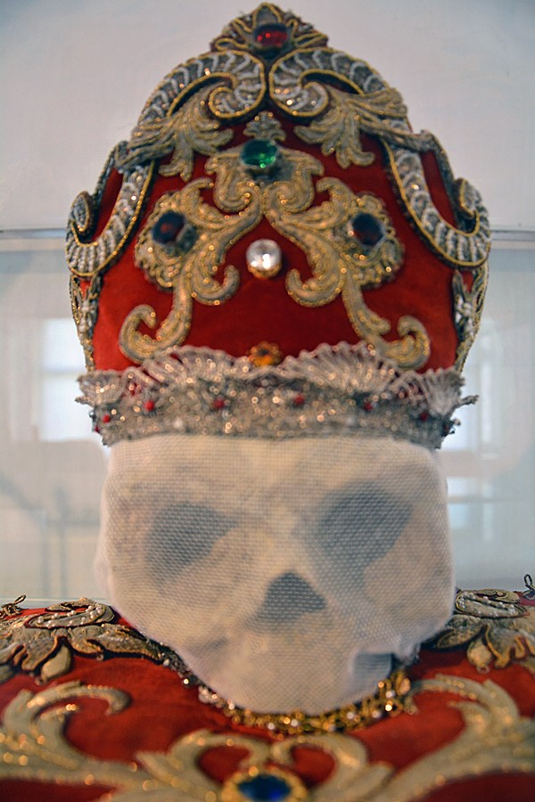 Schädelreliquie des hl. Benignus, Kartaus Ittingen